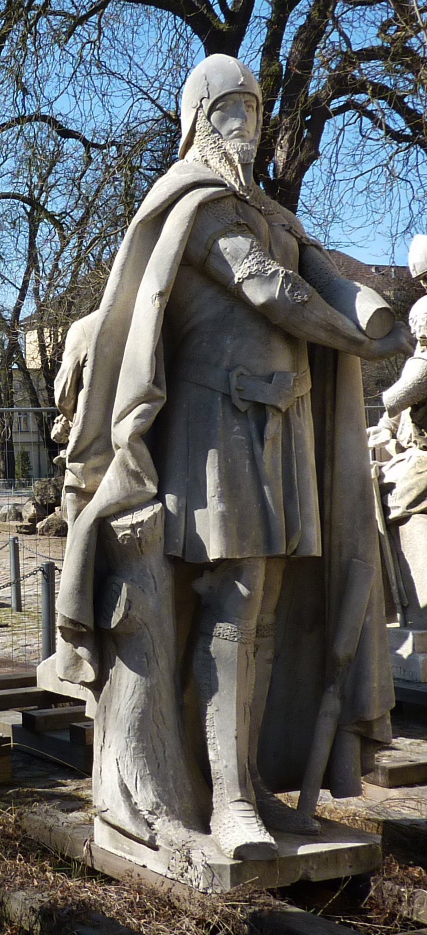 Siegesallee Gruppe 8 Waldemar, enthüllt 1900, Plastiker Reinhold Begas, Standort zZ Zitadelle Spandau